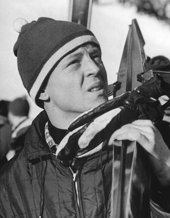 Zentralbild Kohls 22.2.1964 Nordische Skimeisterschaften in Oberhof Karl-Heinz Munk (SC Motor Zella-Mehlis) wurde am 21.2.1964 auf der neuen Schanze im Kanzlersgrund bei Oberhof beim ersten Wertungsspringen der Deutschen Meisterschaft der Spezialspringer Zweiter. Mit Sprüngen von 107 und 106,5 m erreichte er die Note 228,5.